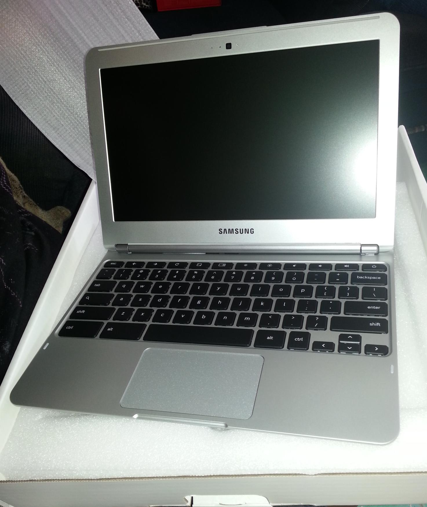 Chromebook Serie 3 de Samnsung